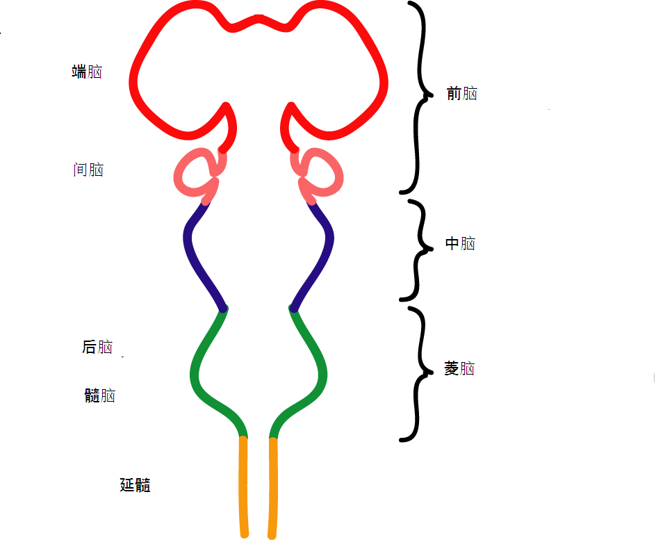 胚胎发育期的脑，來源：英文维基brain条目。